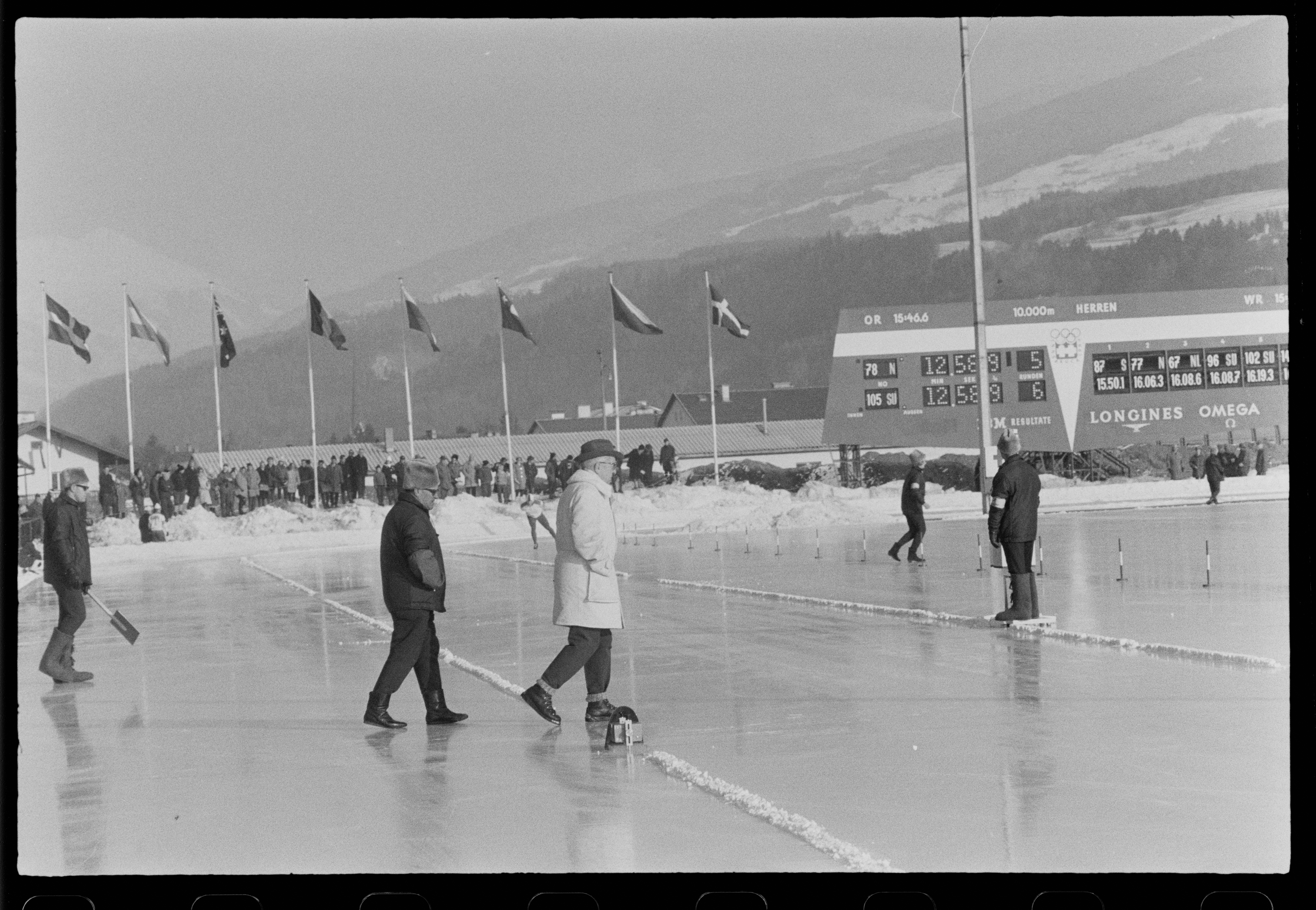 Bildet er hentet fra Arkivverket. OL Innsbruck 1964 500m skøyter Gull Arkivinstitusjon : Riksarkivet Arkivnavn : Billedbladet NÅ Sted : Østerrike, Tirol, Innsbruck, Innsbruck Avbildet: Sven Låftmann